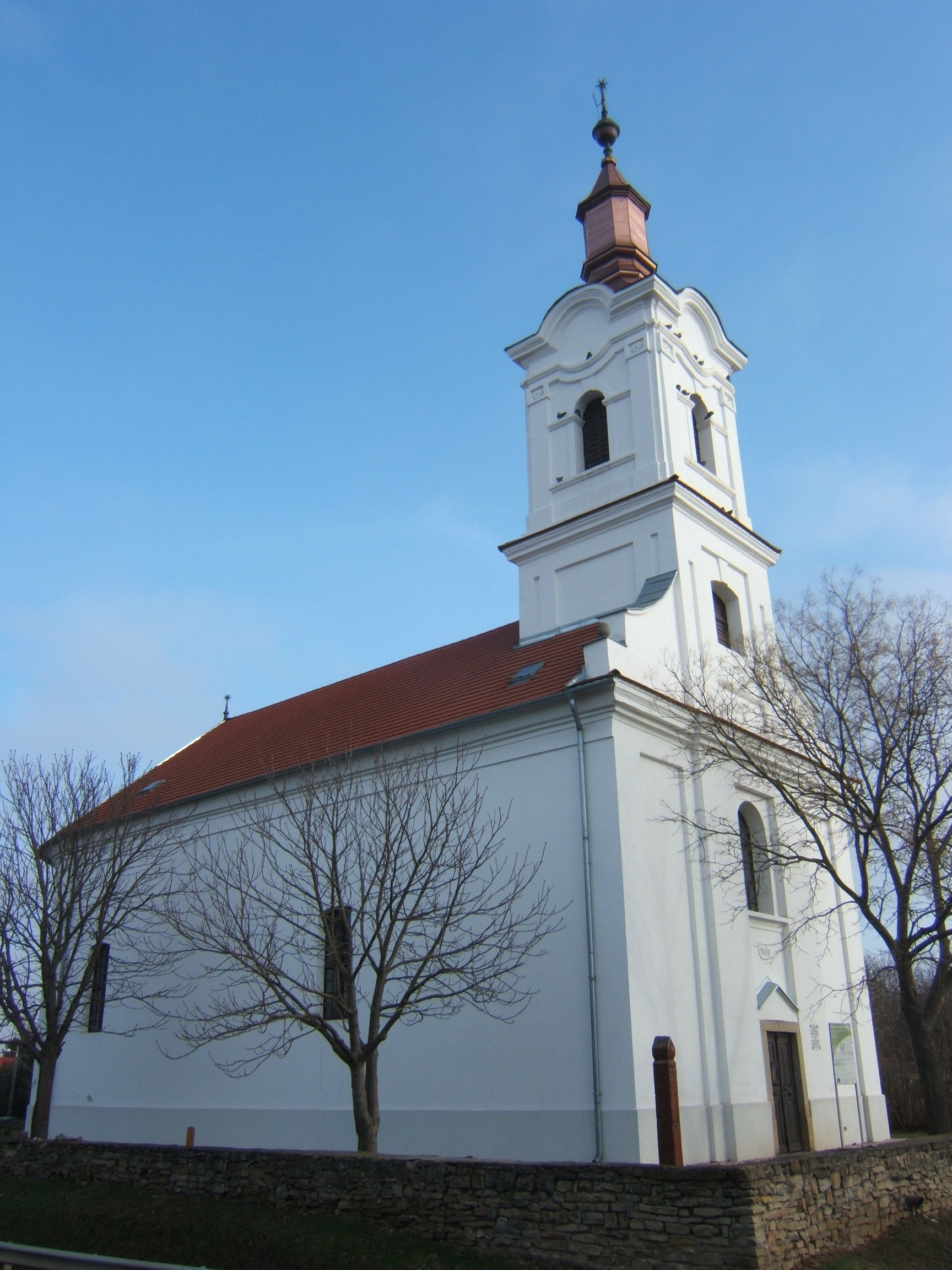 Siójut, református templom